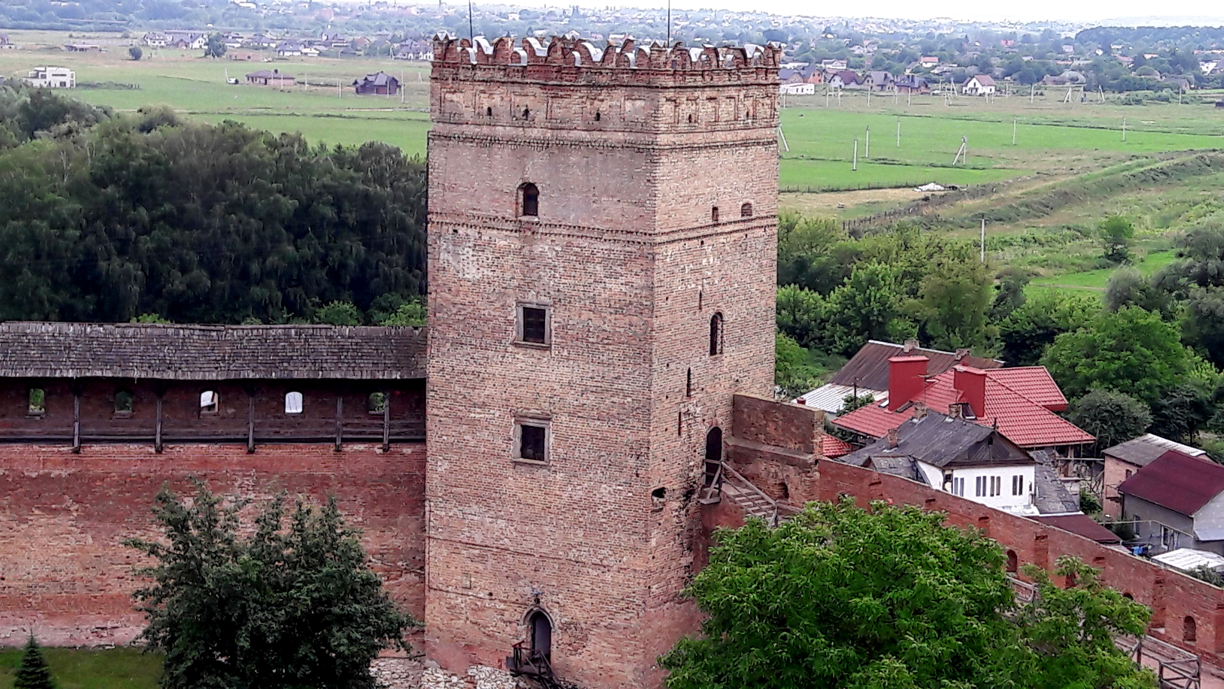 Lucko pilis ukrainoje